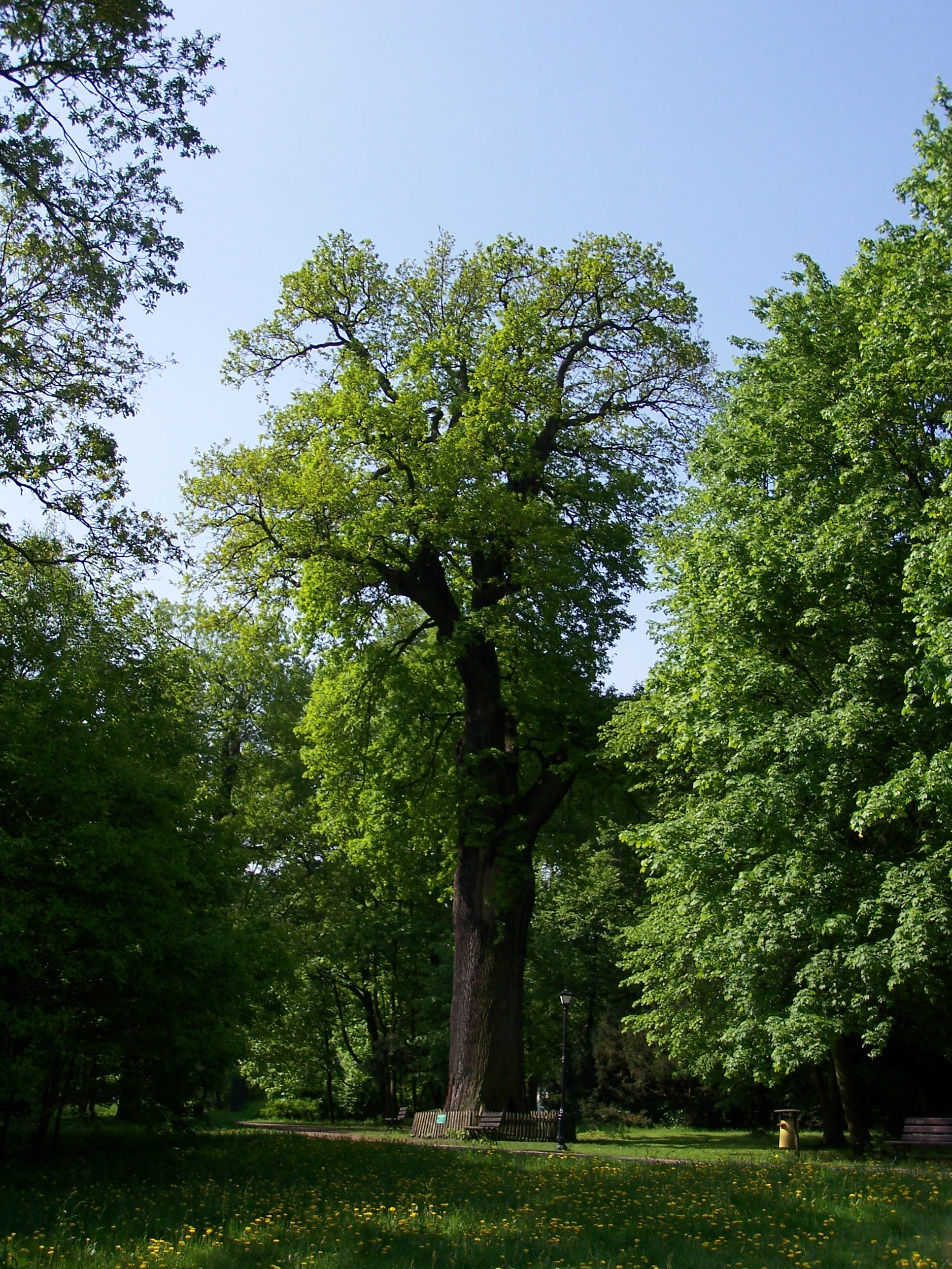 Czterystu-pięćdziesięcioletni dąb szypułkowy "Cysters" (o wymiarach: obwód 710 cm, wysokość 31 m) w parku przy kompleksie klasztorno-pałacowym w Rudach (Raciborskich).